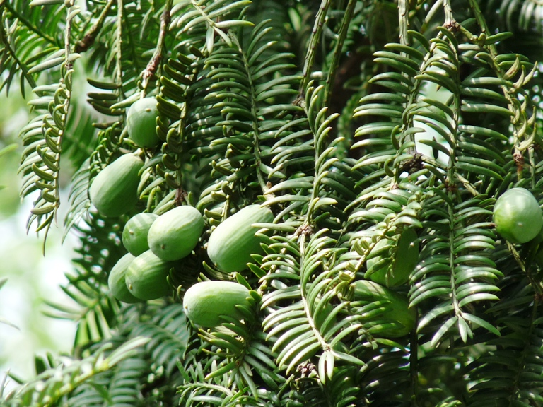 Nusseibe im Botanischen Garten, Shanghai